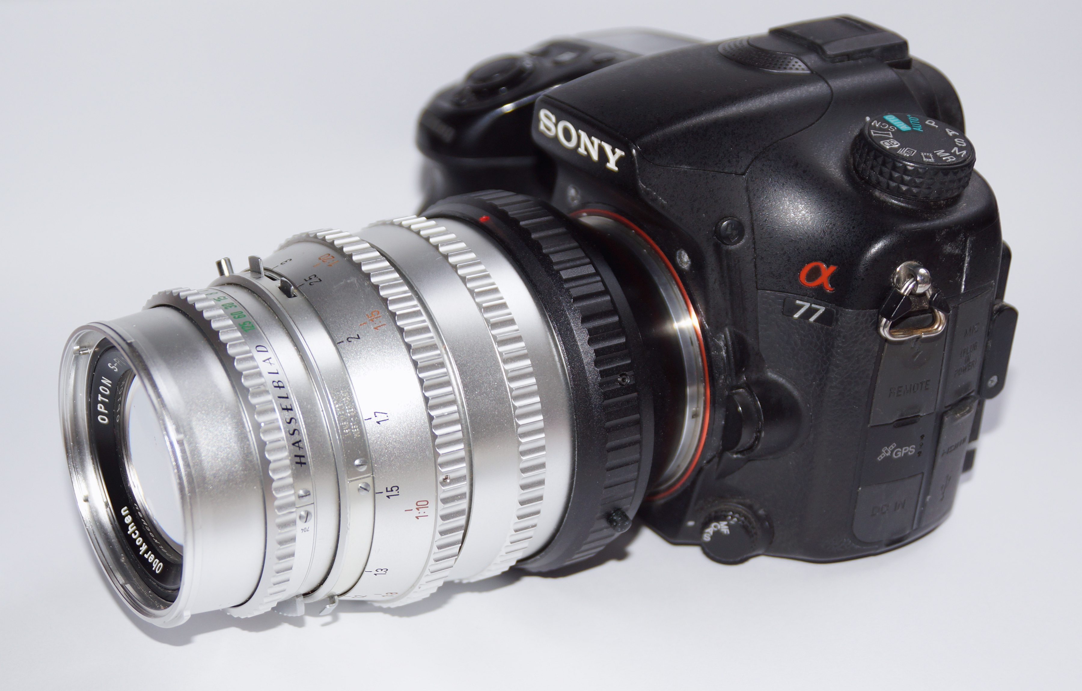 Sony A77, genauer Sony alpha SLT-A77 via Metall-Adapter mit Zeiss-Hasselblad S-Planar Objektiv 1:5.6/120mm Festbrennweite. Foto Wolfgang Pehlemann DSC04928